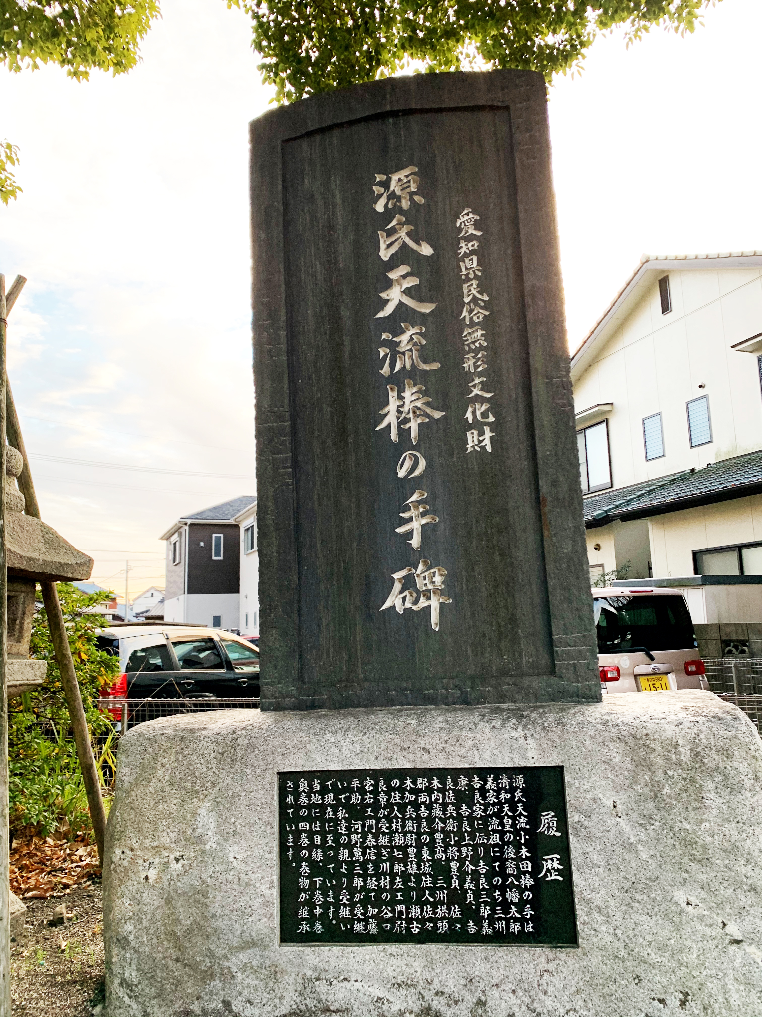 10月の祭礼で源氏天流棒の手が奉納される小木田神社にある「源氏天流棒の手碑」。流派の履歴と愛知県無形民俗文化財であることが記されている。